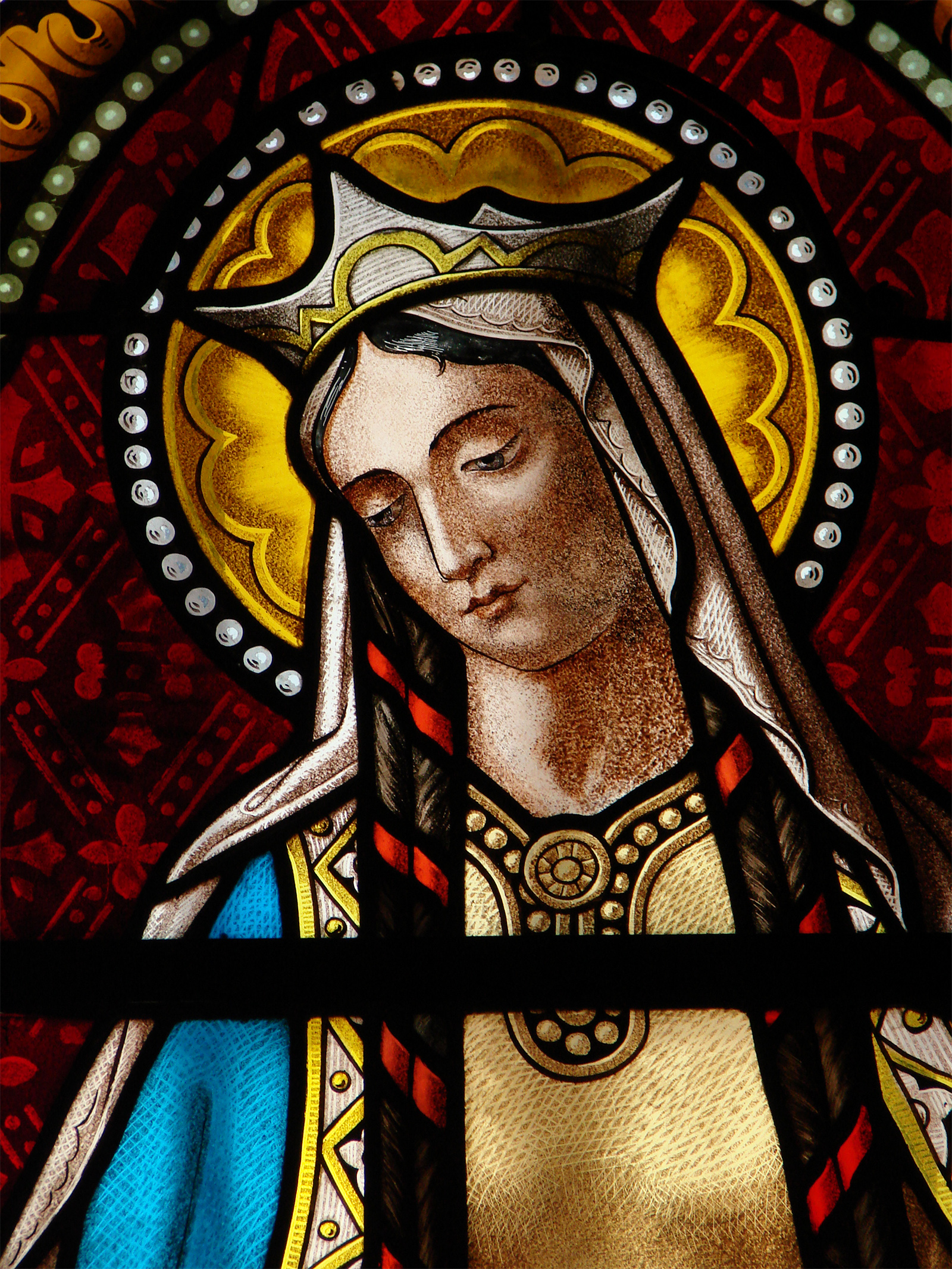 Vitrail néogothique dans l'église Saint-Martin de Florac: Sainte Clothilde.